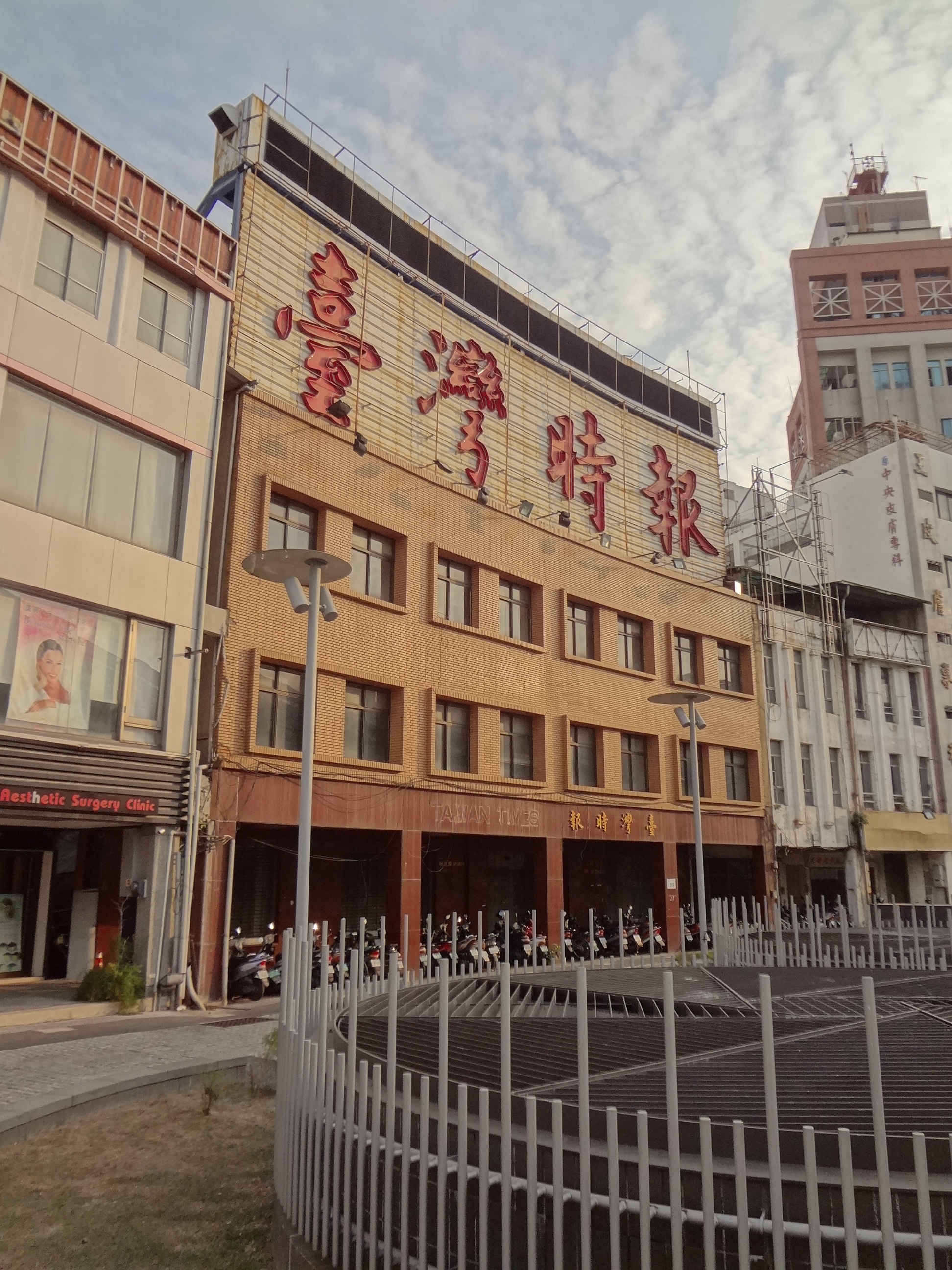 原臺灣時報總社，位於高雄市新興區中山一路110號。